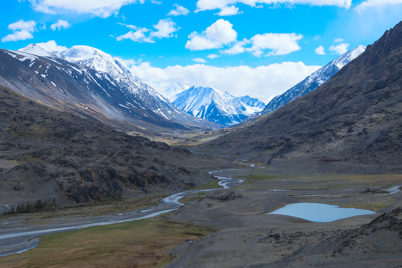 Река Аккол